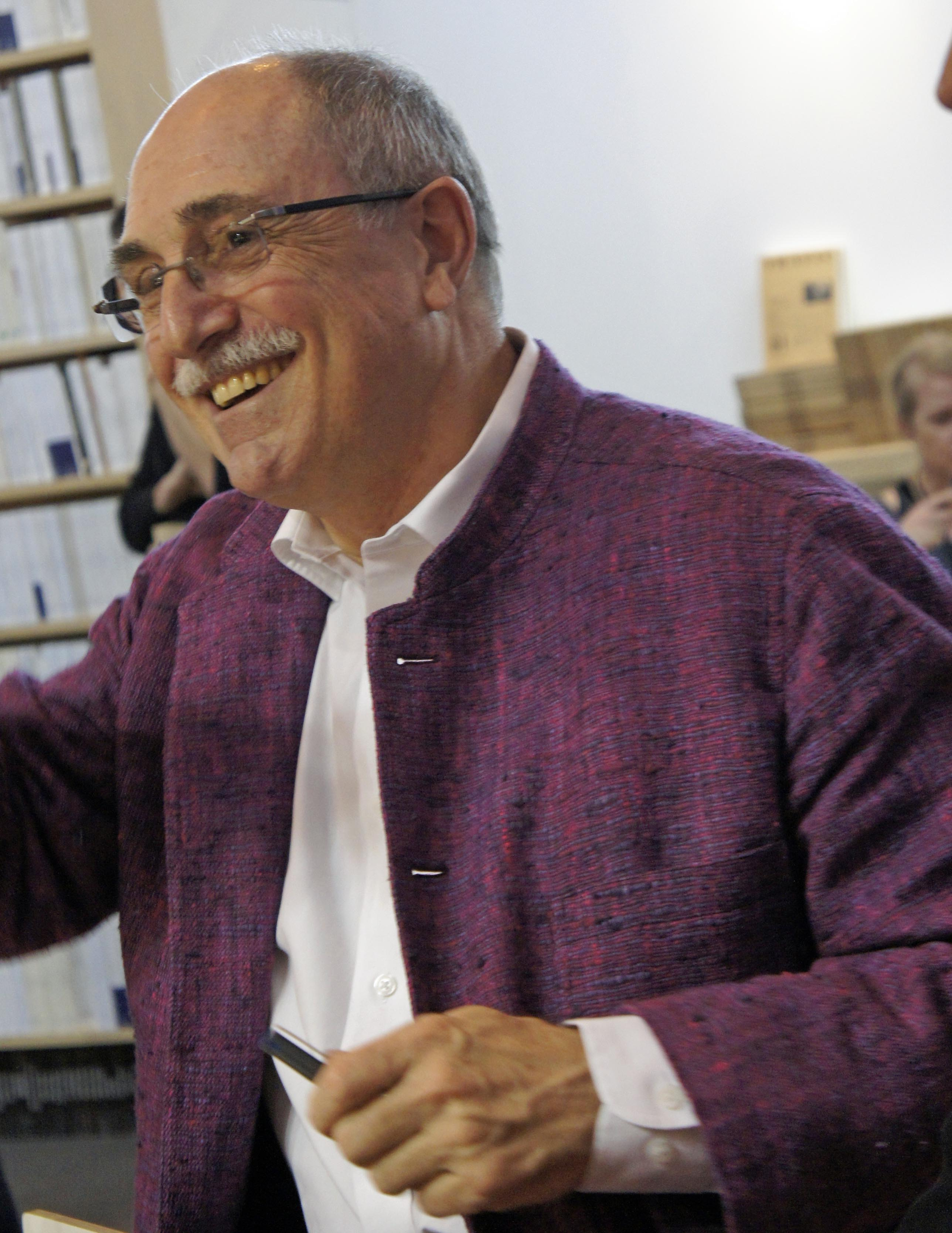 Paul Fournel au salon du Livre 2012.